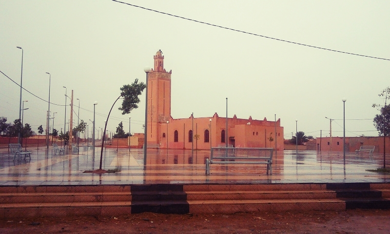 عين الشواطرعين الشواطر هي جماعة قروية تابعة لإقليم فكيك ضمن الجهة الشرقية بالمغرب. بلغ مجموع عدد سكان عين الشواطر حسب إحصاءات 2004 حوالي 1144 نسمة يعيشون في 188 أسرة.